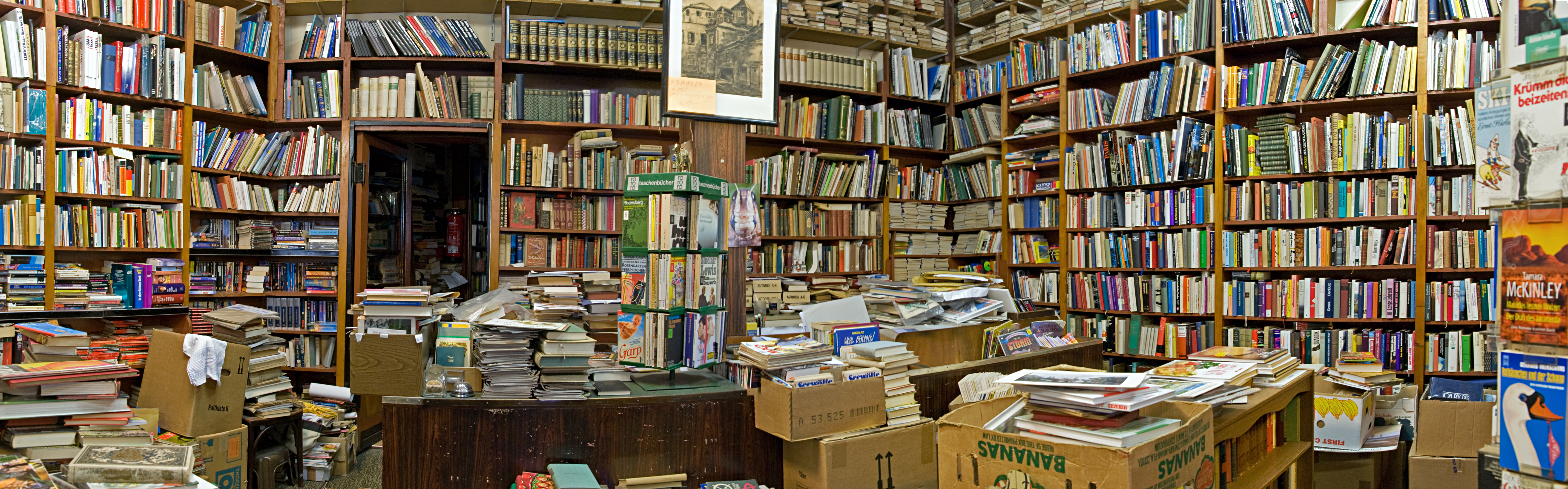 Antiquariat in Frankfurt-Höchst